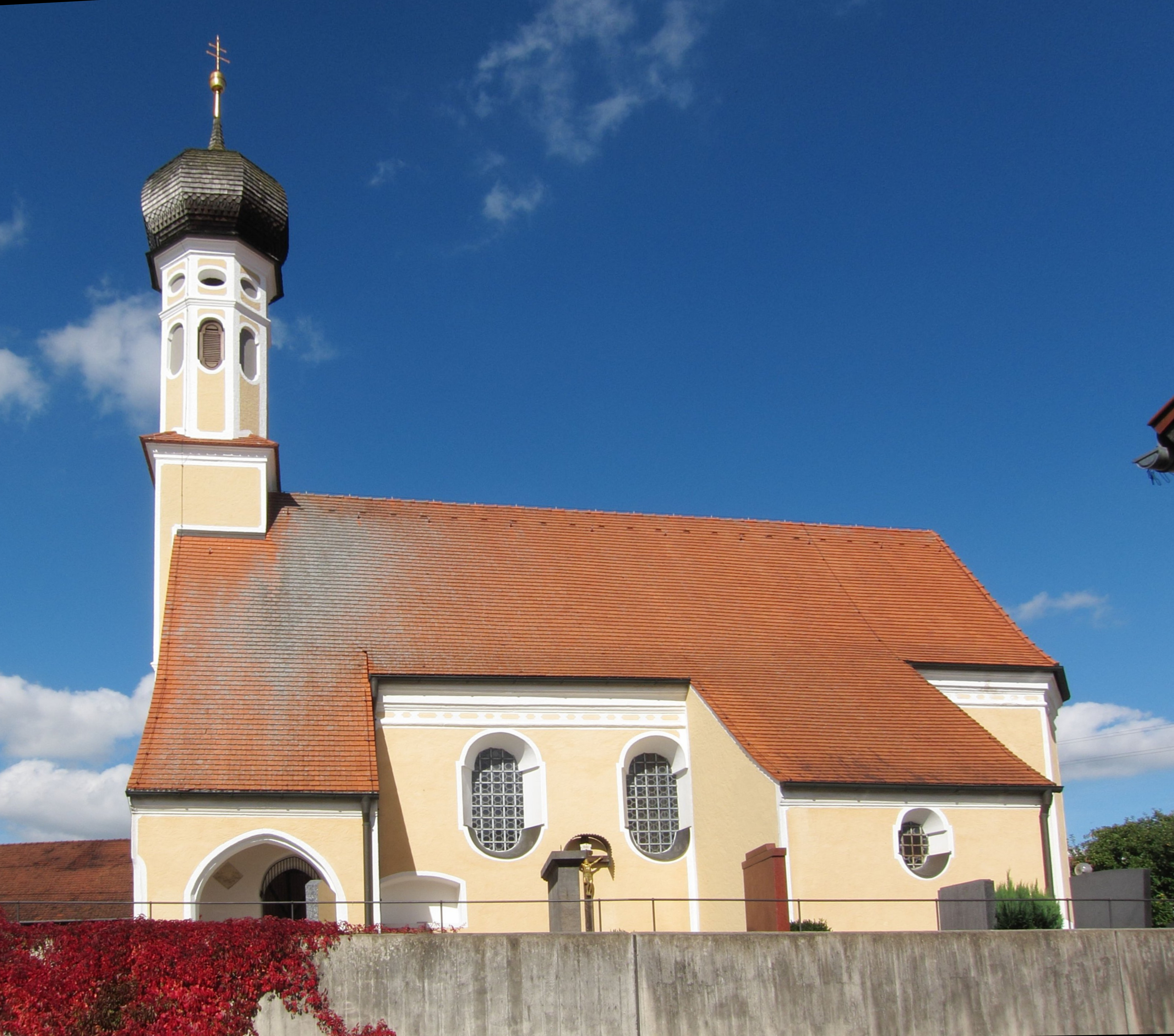 Kath. Filialkirche St. Stephanus, Saalbau mit polygonalem Chorabschluss, angefügter Sakristei und Dachreiter mit Zwiebelhausbe, um 1500 erbaut, von Hans Kogler 1686 barockisiert; mit Ausstattung.